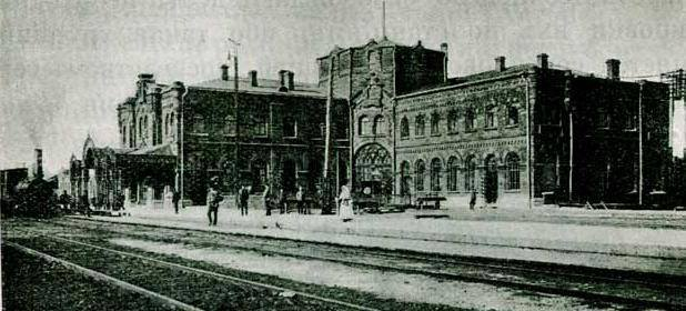 Дореволюционное Дебальцево